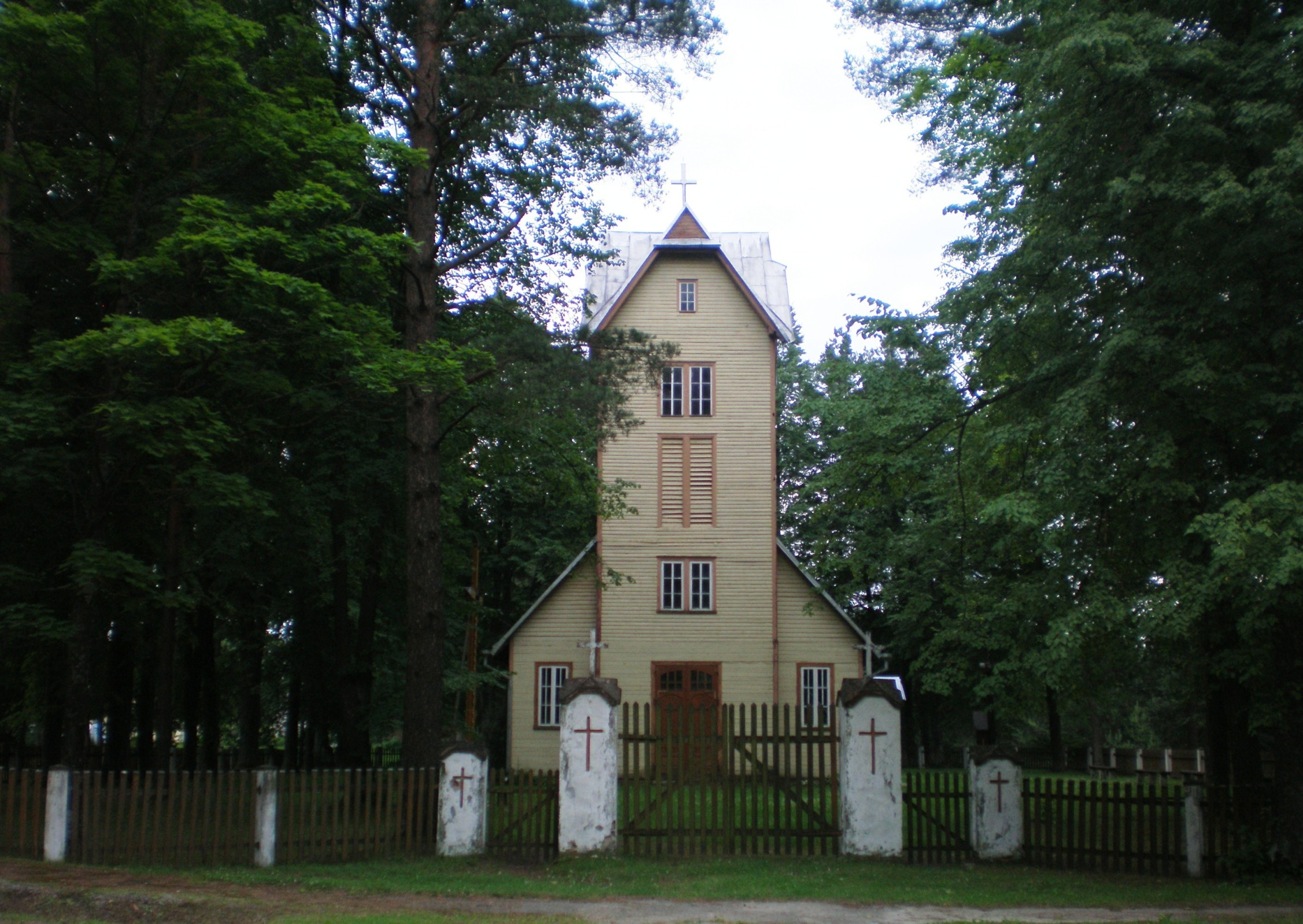 Ąžuolų Būda, Kazlų Rūdos sav.